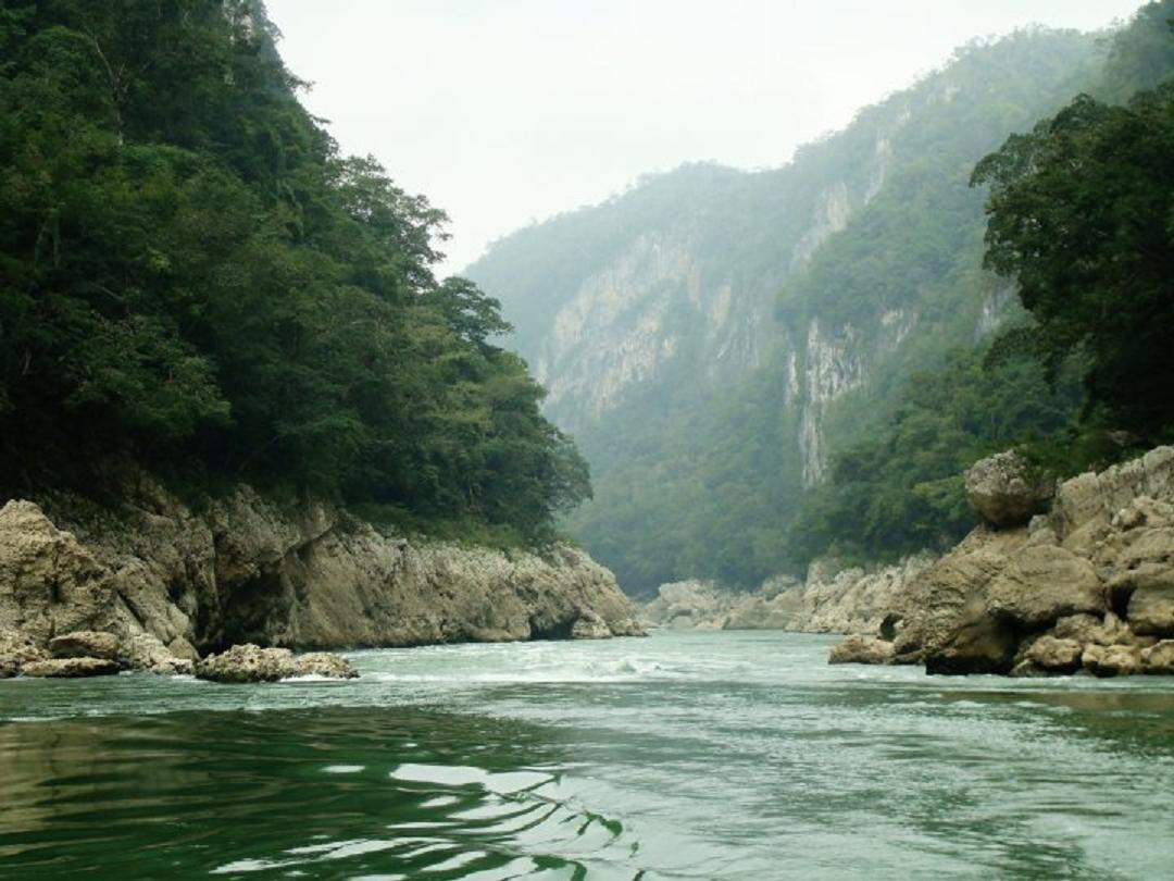 Paisaje del Cañón del Usumacinta, en la reserva ecológica del mismo nombre, en el municipio de Tenosique, Tabasco, México.